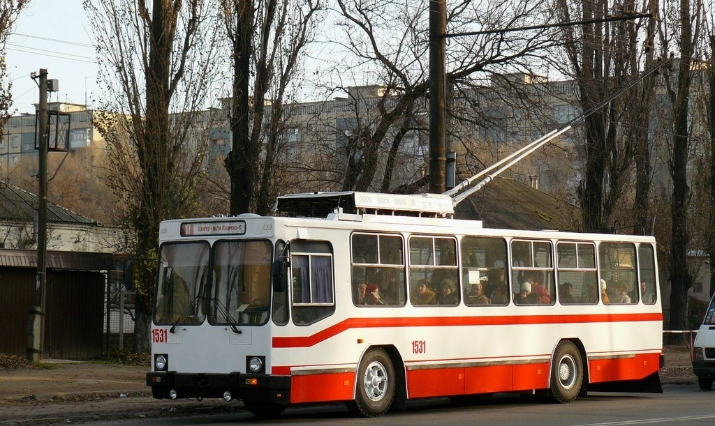 после ср